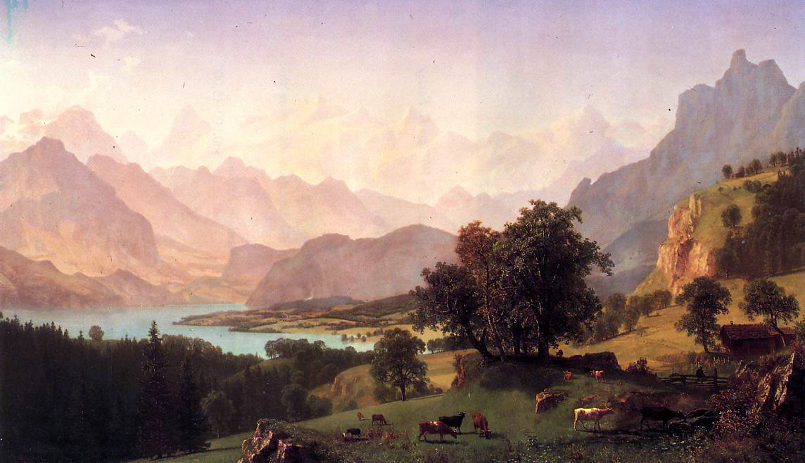 Bernese Alpstitle QS:P1476,en:"Bernese Alps" label QS:Len,"Bernese Alps" label QS:Lde,"Berner Alpen"